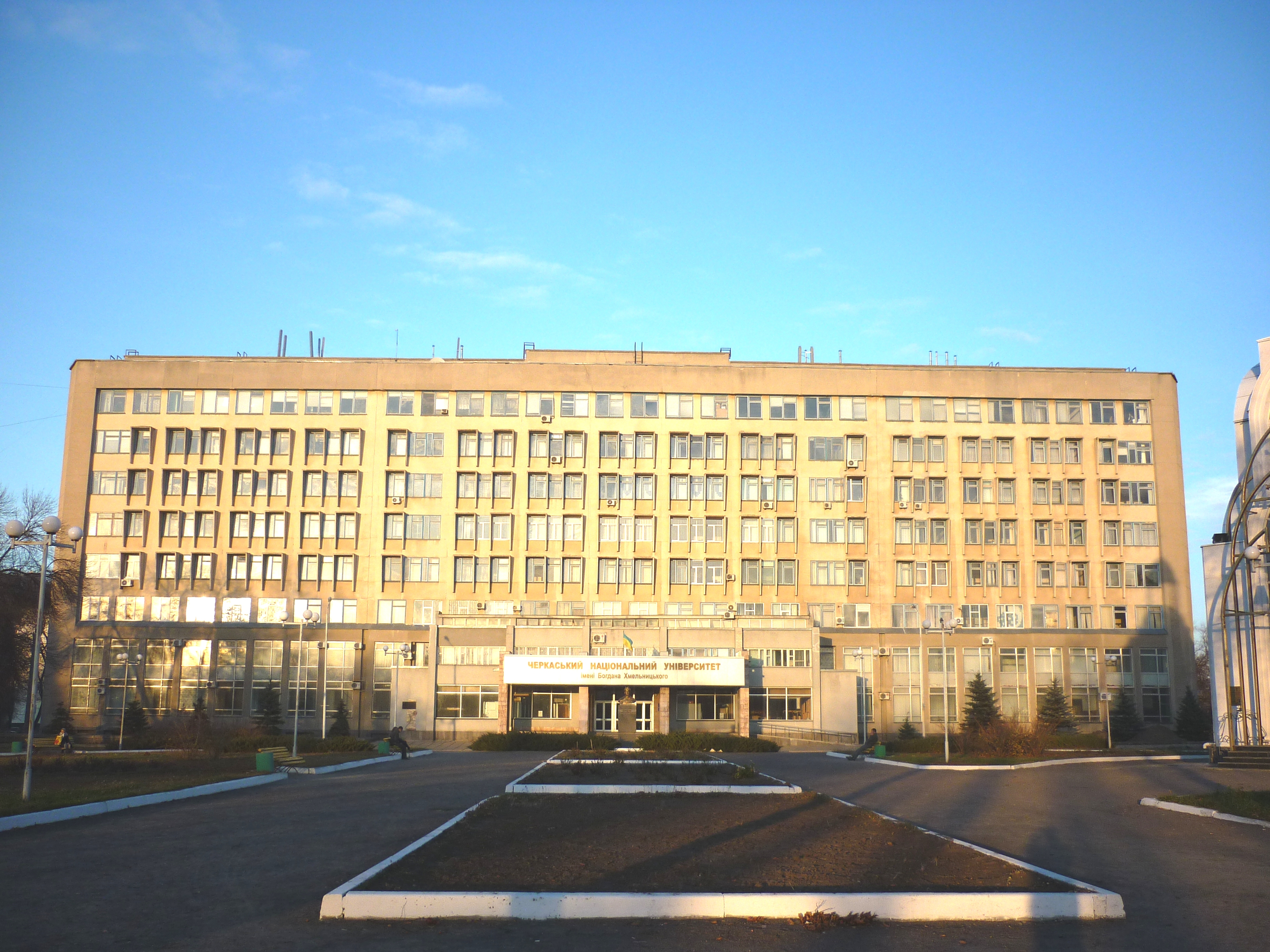 Головний корпус ЧНУ